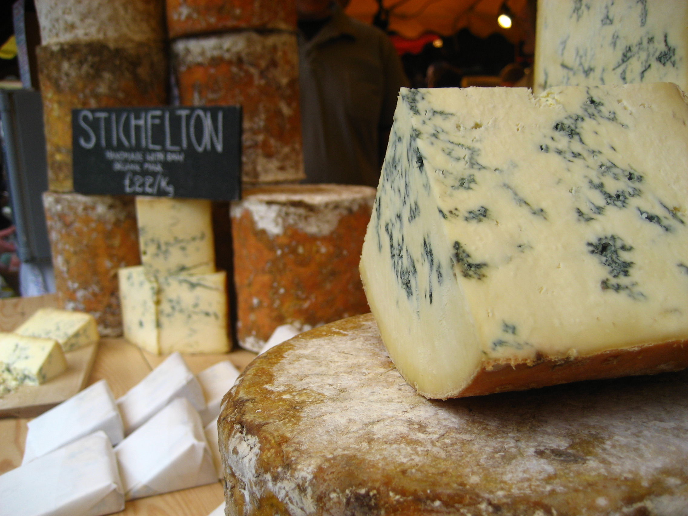 Stichelton